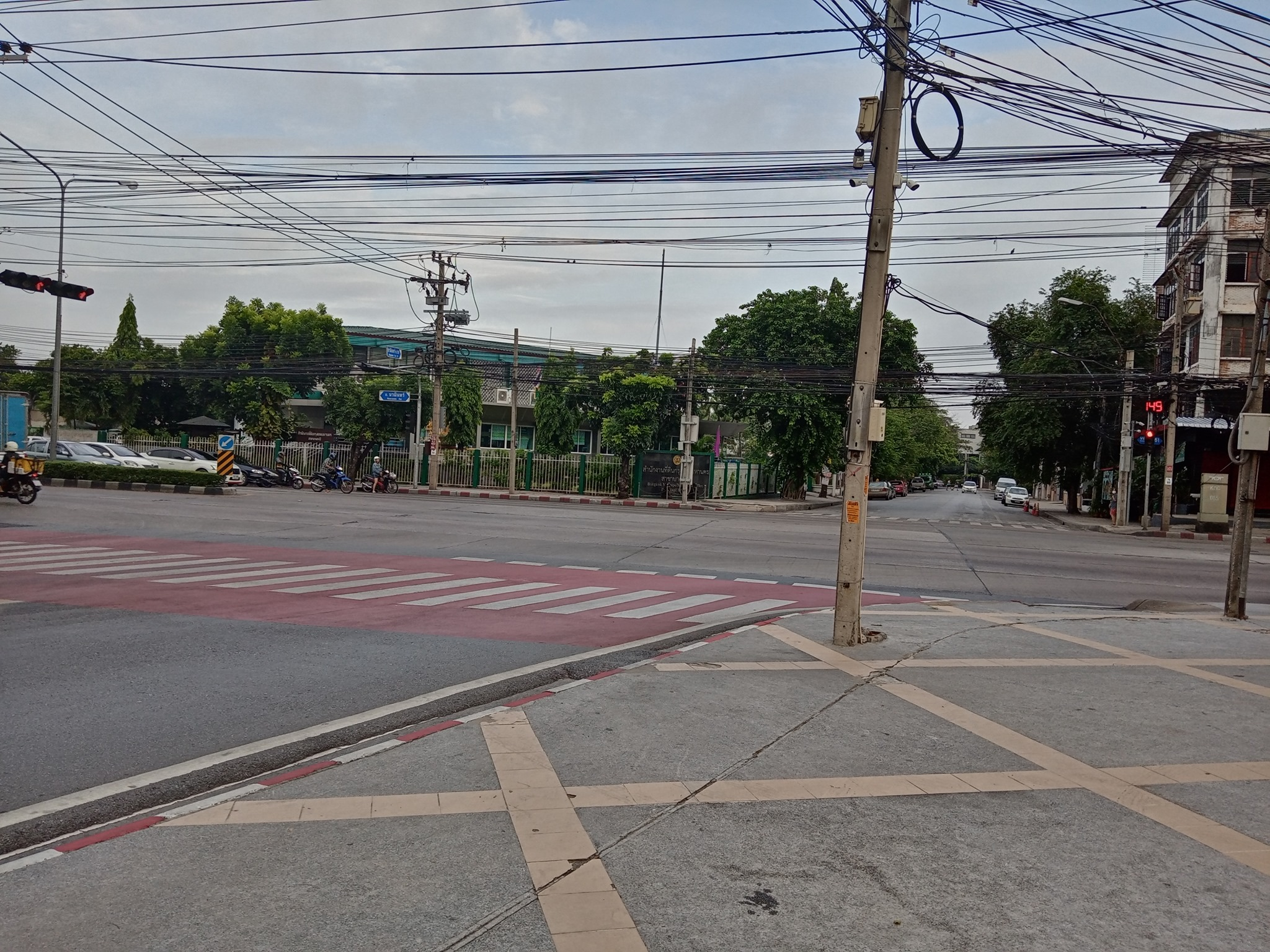 Kan Kheha Intersection, Bang Kapi, BKK.